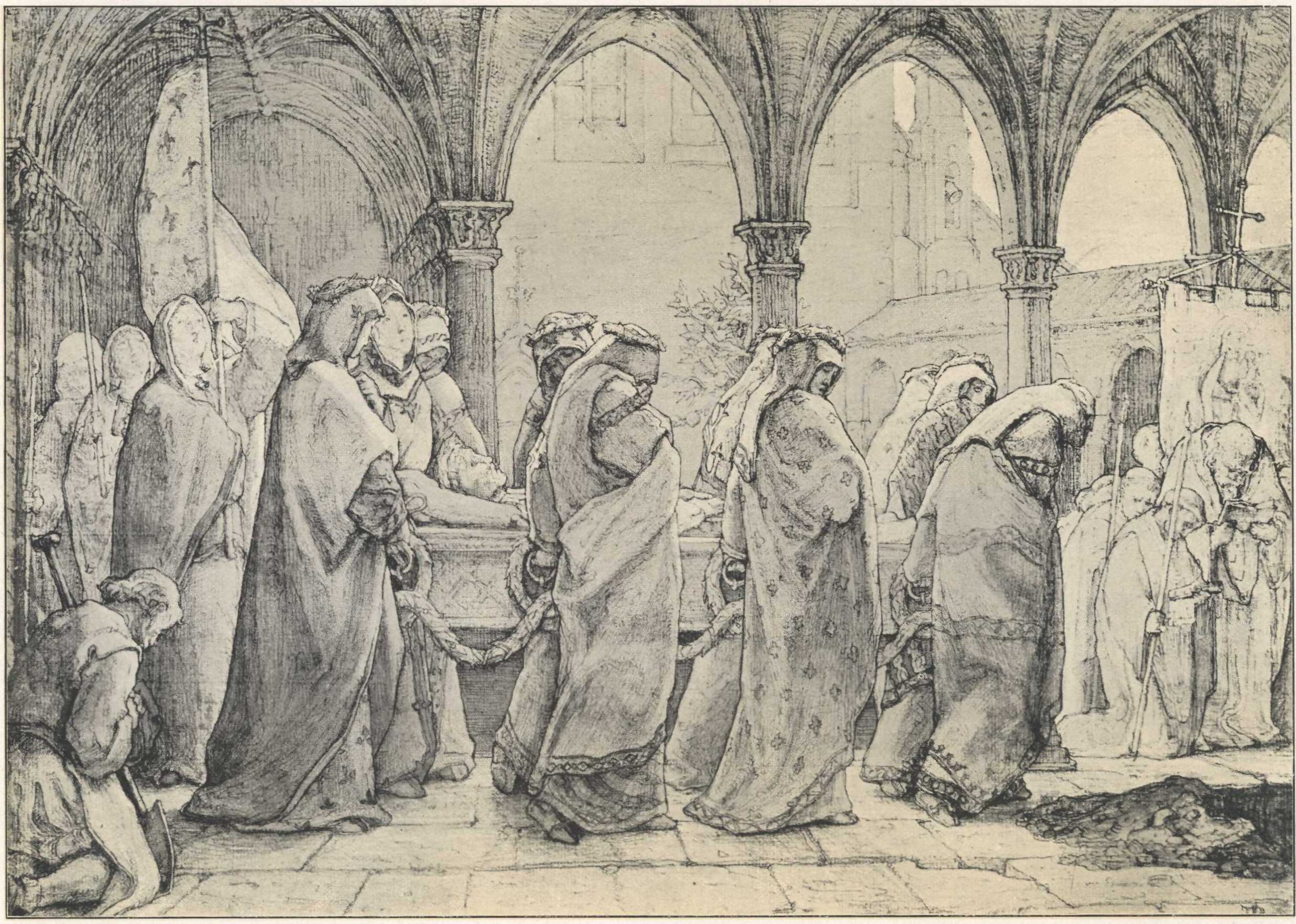 Frauenlobs Begräbnis (lt. Quelle) Bildbeschreibung im Artikel Alfred Rethel in der ADB: Daß R. auch die zarteren und innigen Seelenregungen zu verkörpern wußte, beweist die klar und groß gehaltene Darstellung der „Bestattung Heinrich Frauenlobs durch edle Frauen“. Welch’ poetische Stimmung! Es ist der weihevolle Ausdruck edler, von wahrem Schmerze hingerissener Weiblichkeit. Diese Zeichnung, welche als eine der schönsten und ergreifendsten zu bezeichnen ist, hat R. drei Mal in den verschiedenen Perioden seines Künstlerlebens beschäftigt, zunächst für den „Rheinischen Sagenkreis“, dann 1840 in völlig veränderter Auffassung für die ihm befreundete Familie von Georg Springsfeld in Frankfurt a. M. (jetzt im Besitz des Senator Dr. Speltz daselbst) und endlich das dritte Mal für seine Braut im J. 1851.